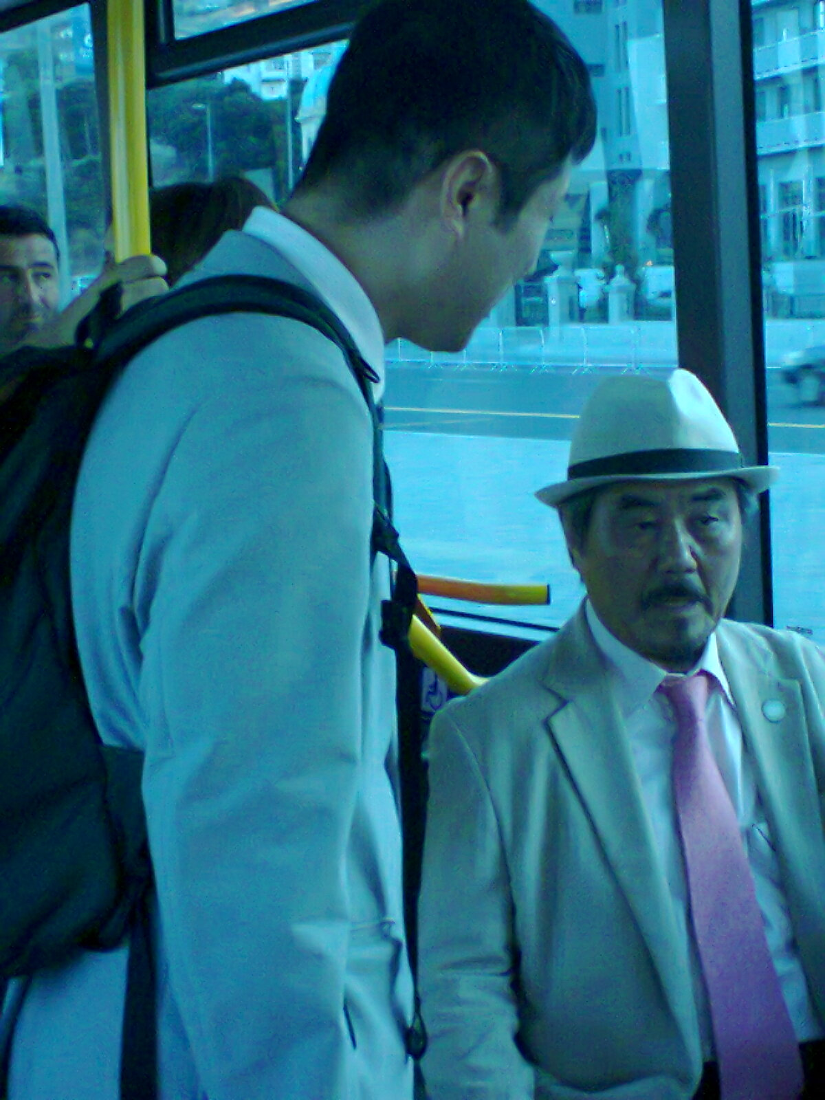 Masayuki Hisataka Bakıda 2015 Avropa Oyunlarından sonra avtobusda.